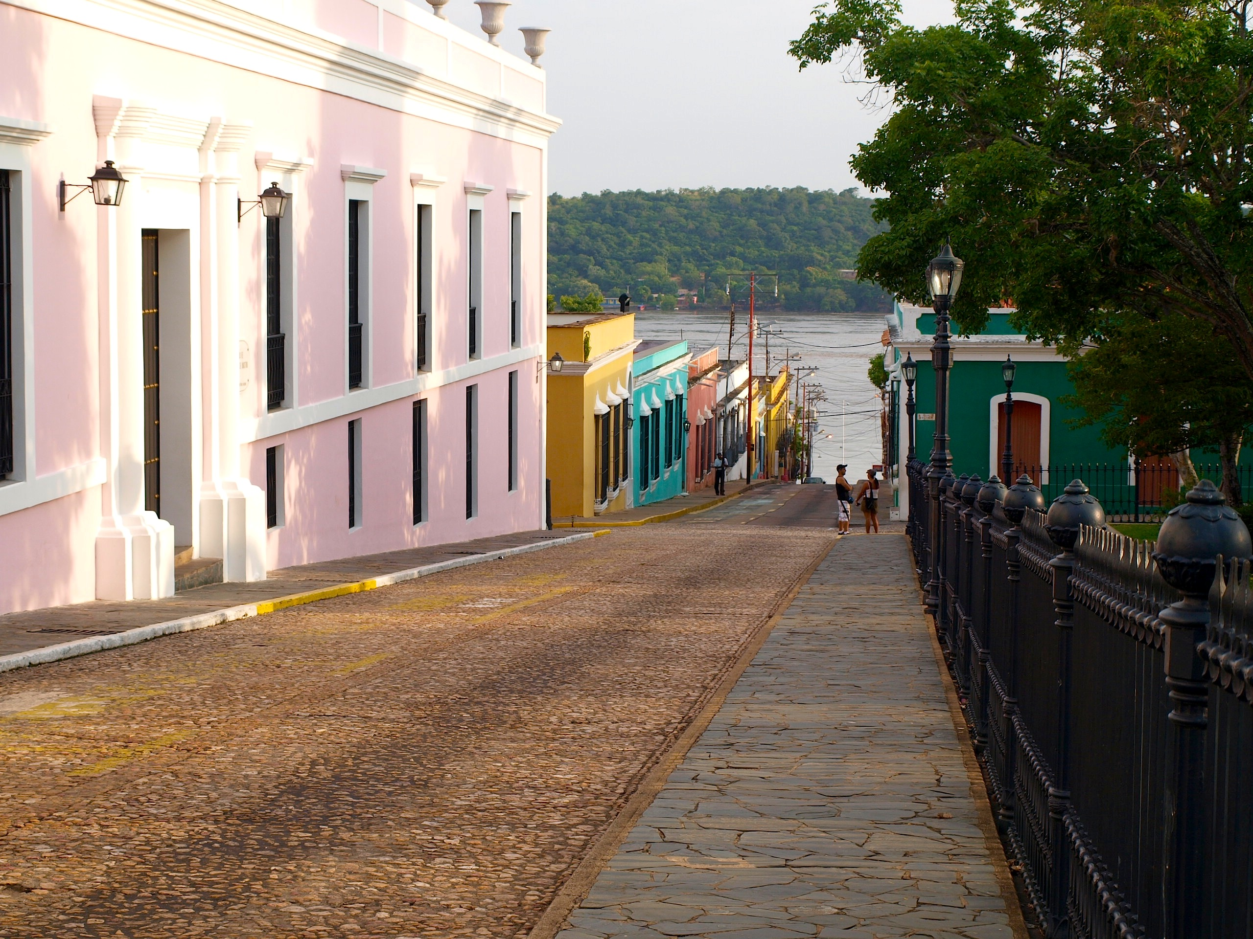 Calle de ciudad Bolívar con el Orinoco al final